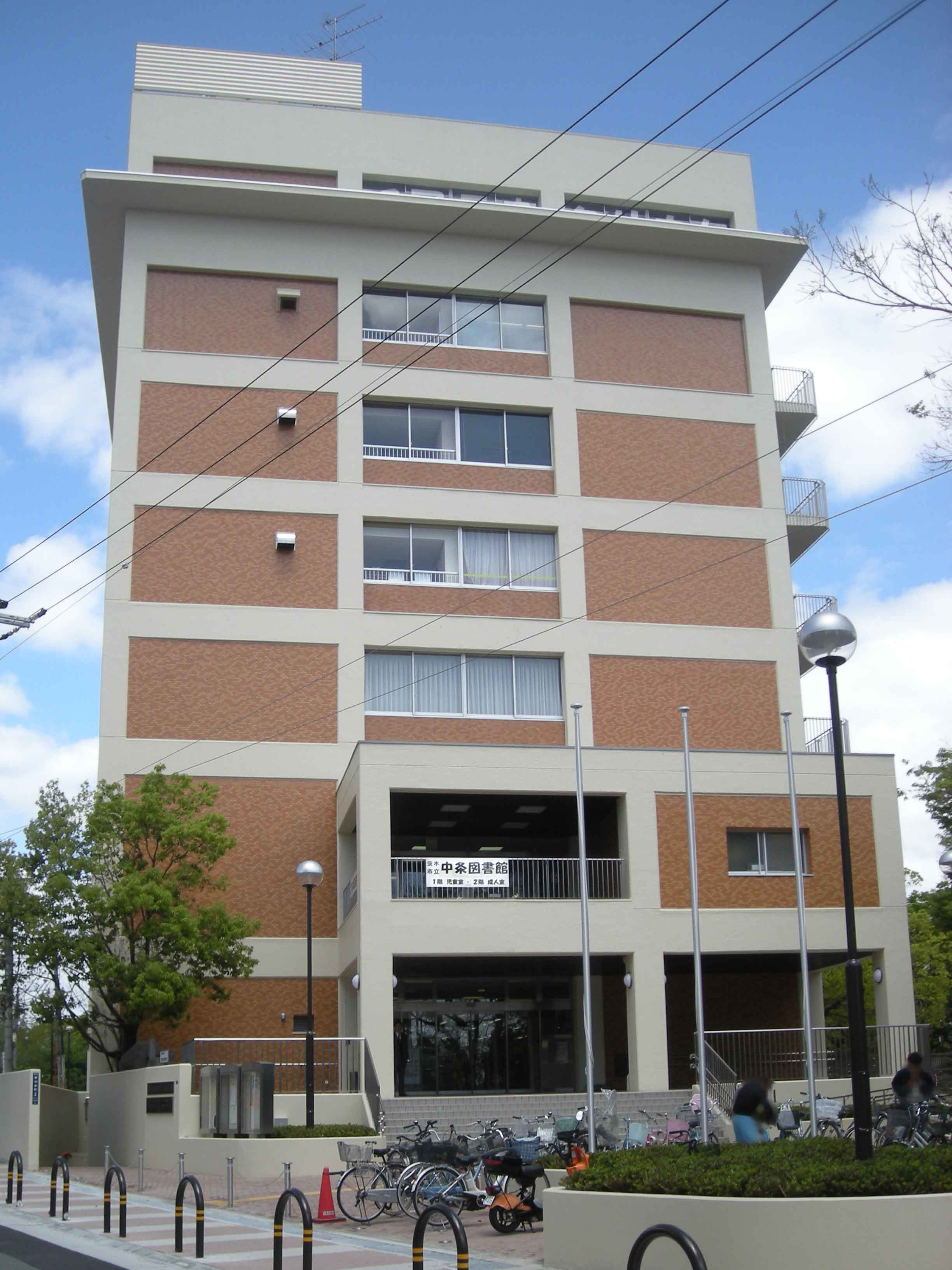 茨木市立中条図書館